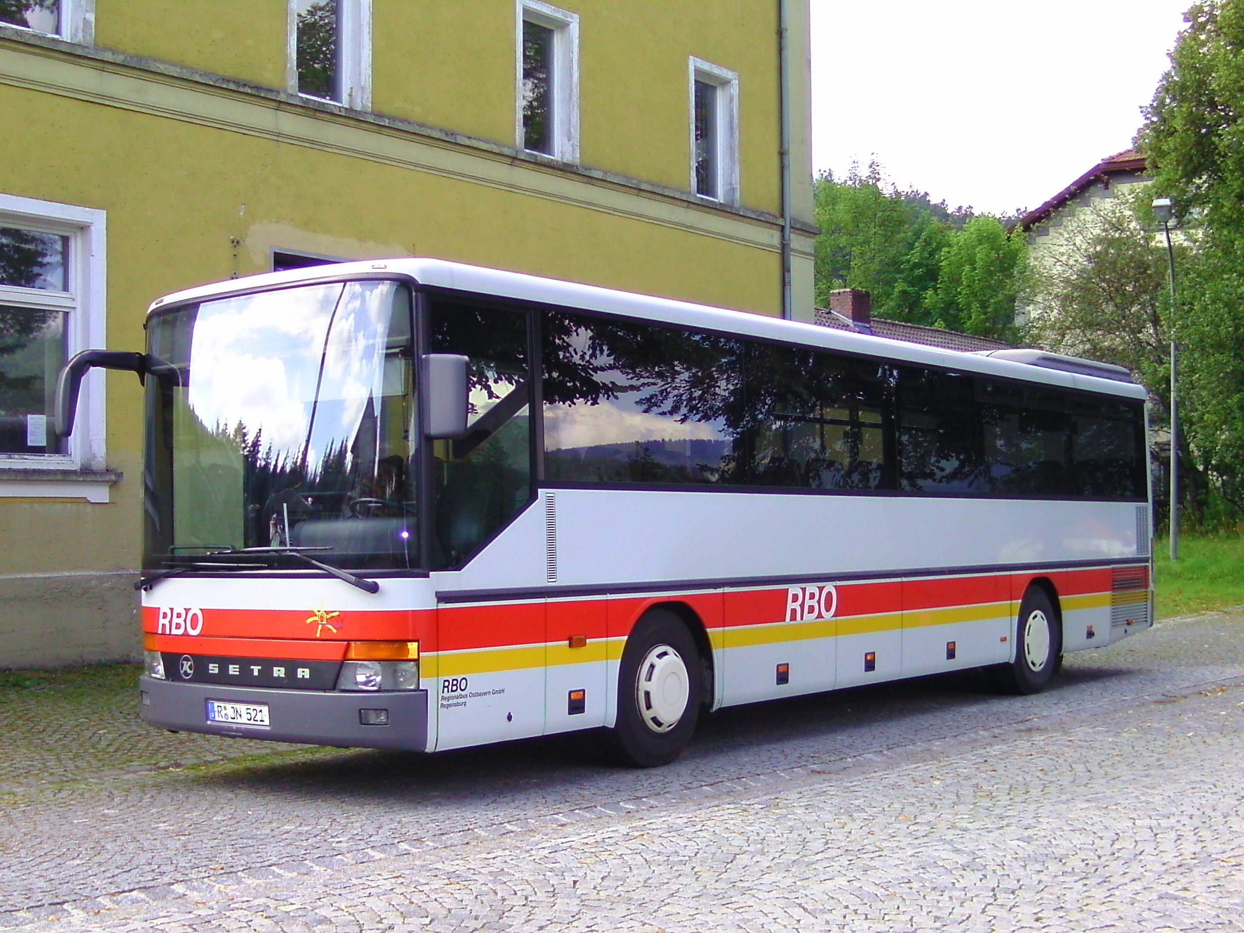 Bus von RBO in alter Lackierung in Bayerisch Eisenstein